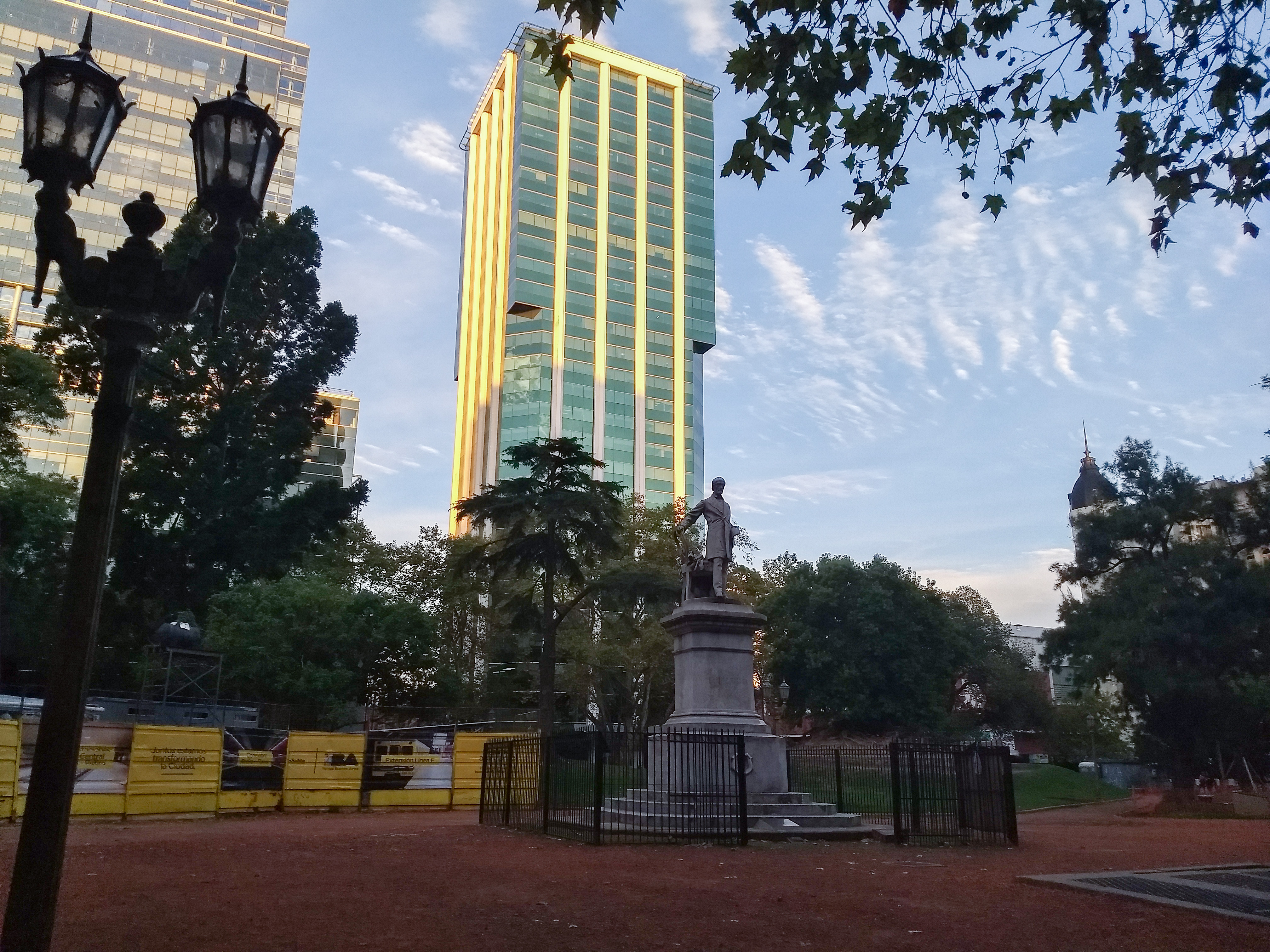 Atardecer en la plaza Roma, en el barrio de San Nicolás, Ciudad de Buenos Aires.